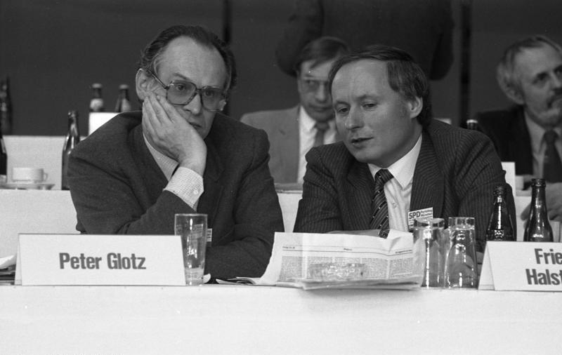 SPD-Parteitag in der Olympiahalle in München